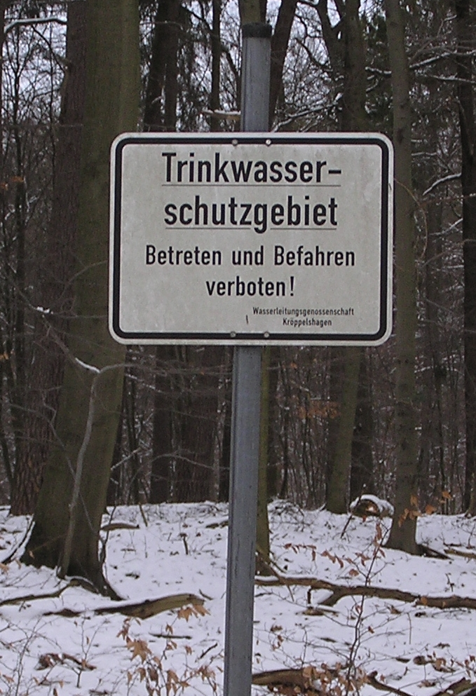 Schild Trinkwasserschutzgebiet Wasserschutzzone I - Fassungsbereich. Steht ca. 800m westlich von Dassendorf im südlichen Sachsenwald in Schleswig-Hollstein nördlich der B207 bei der Waldsiedlung Bornberg (zu Kröppelshagen-Fahrendorf), Entfernung zur Quelle ca. 30m.